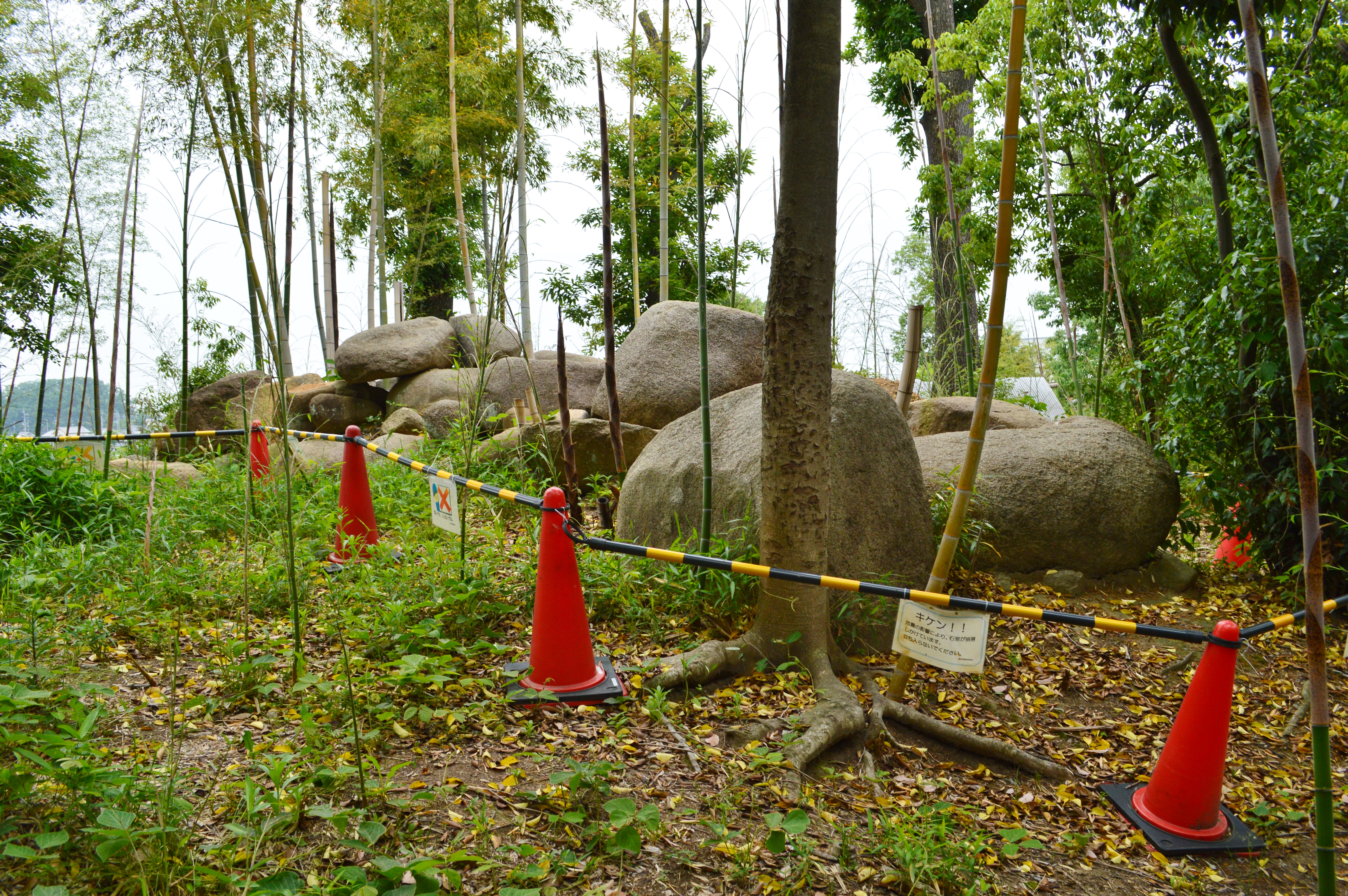 海北塚古墳 横穴式石室 Nikon D3200